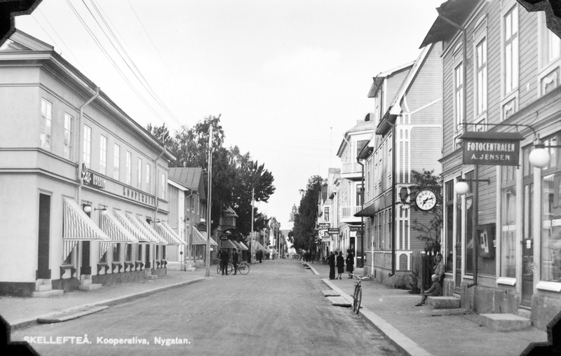 Nygatan österut i Skellefteå 1927. Till vänster Kooperativa och till höger Fotocentralen, ägare A Jensen.